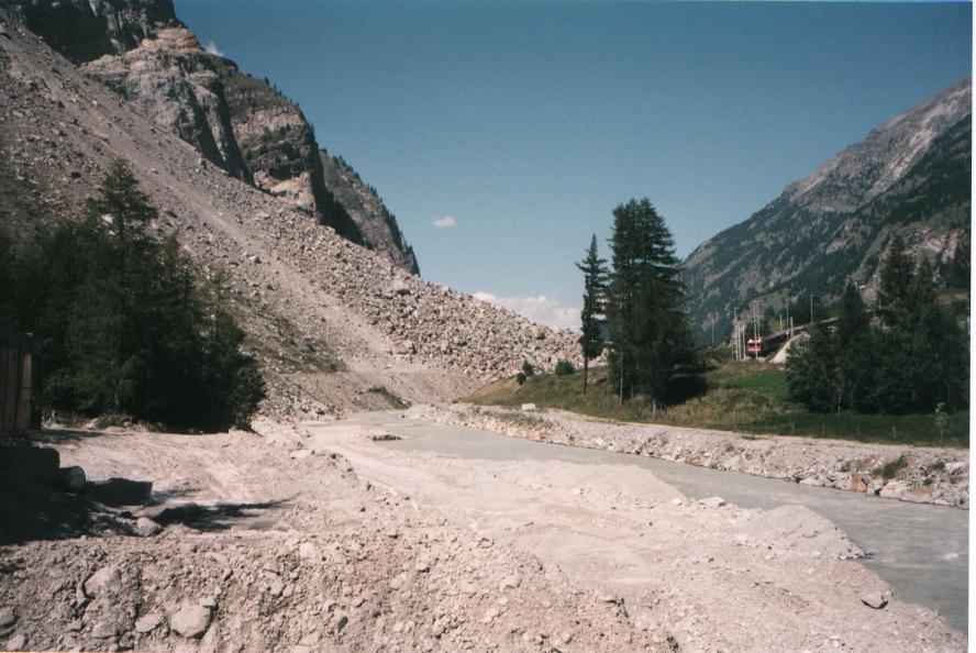 Description